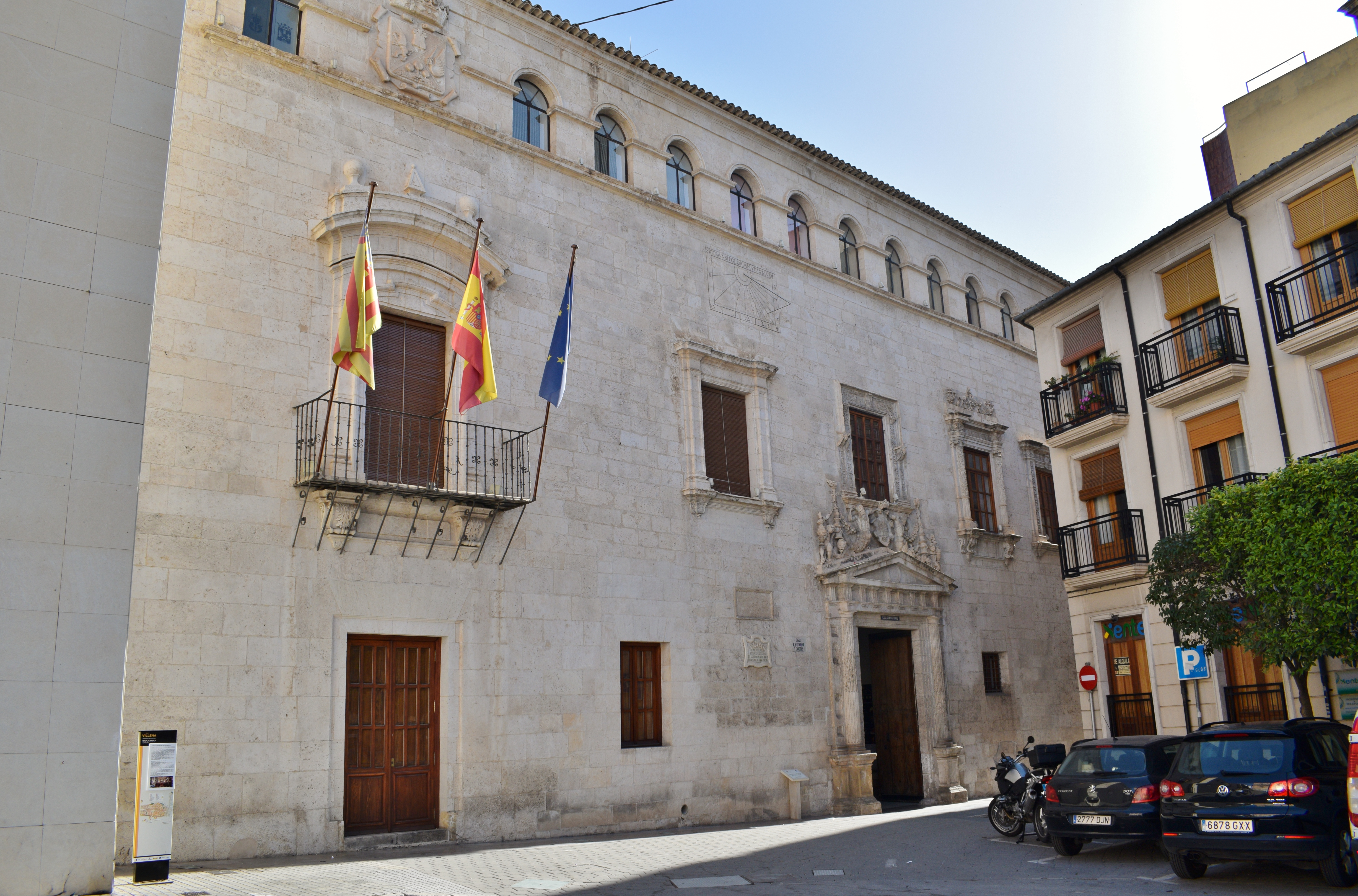 Villena.